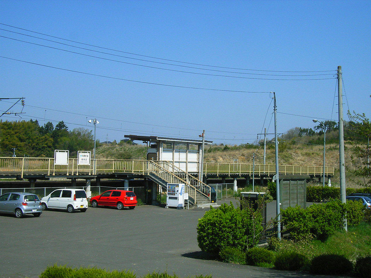 Minamikakuda Station of the Abukumakyuko Line. Kakuda, Miyagi prefecture, Japan.